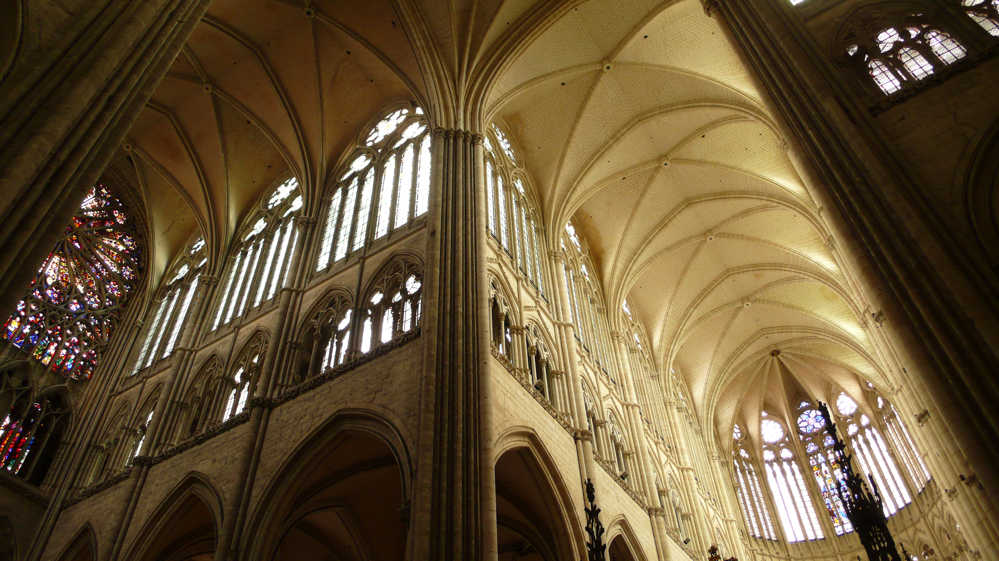 Kathedrale von Amiens, Frankreich; Nordquerhaus mit Rose, Chor